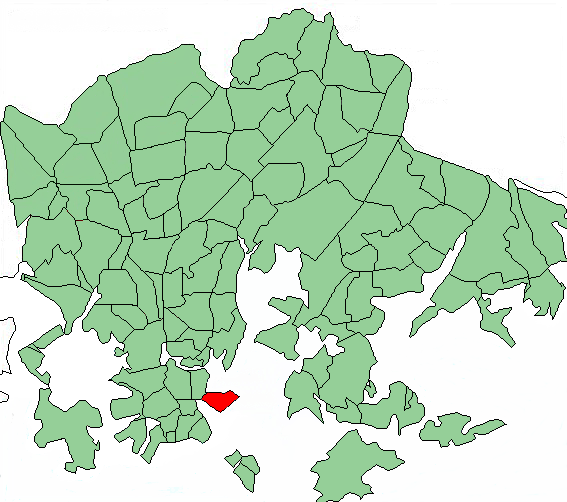 Map of Helsinki highlighting Katajanokka